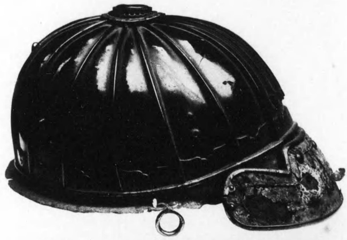 石上神宮所蔵・十六間阿古陀形筋兜鉢。室町時代の作。